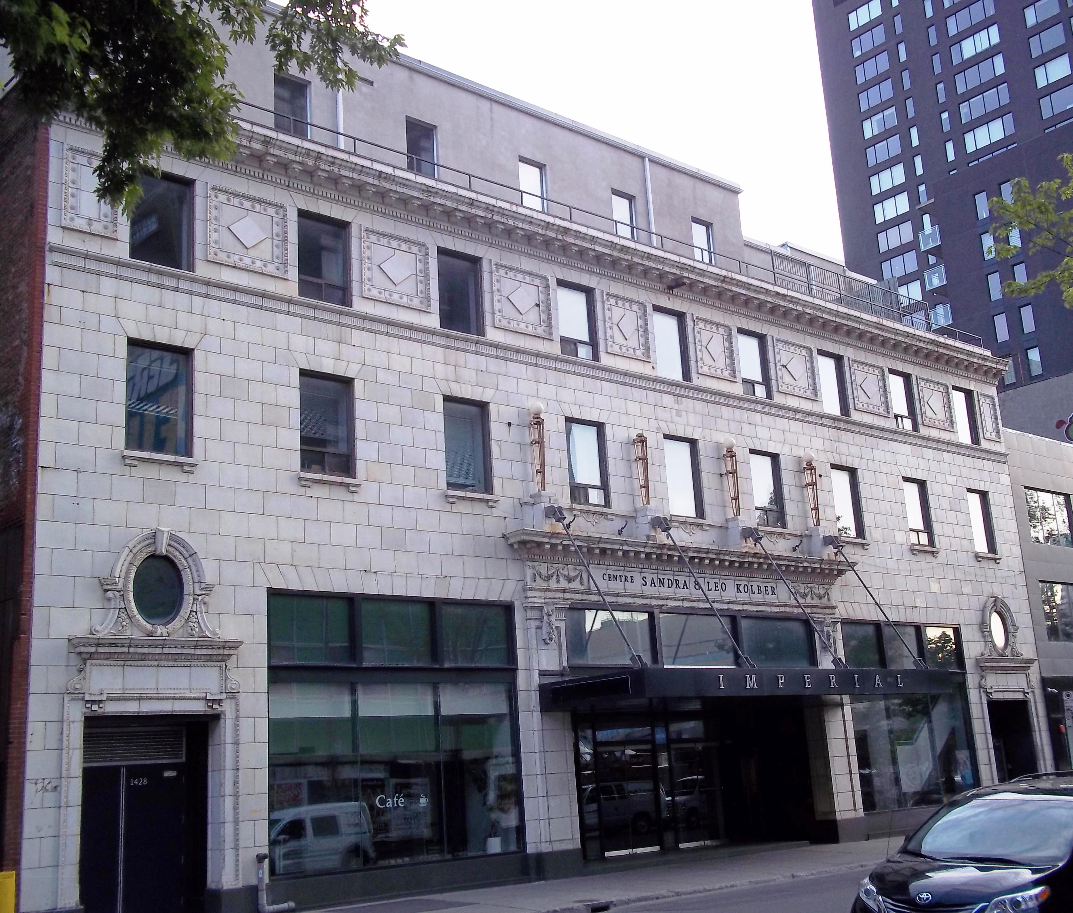 Cinéma Impérial, au 1424-1432, rue De Bleury, Montréal